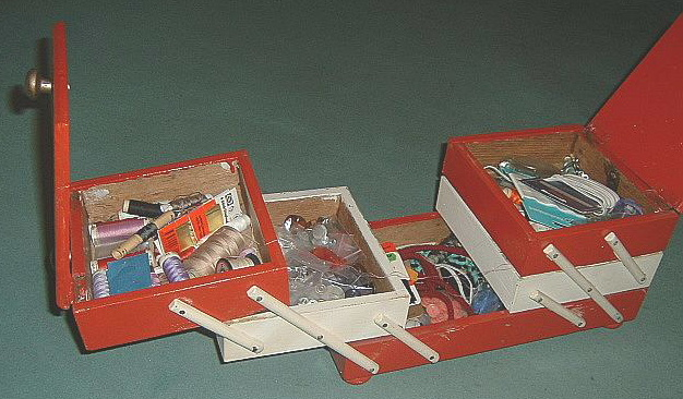 selbst fotografiert am 1.10.04, PD und GNU, Bild : geöffnetes Nähkästchen Lizenz